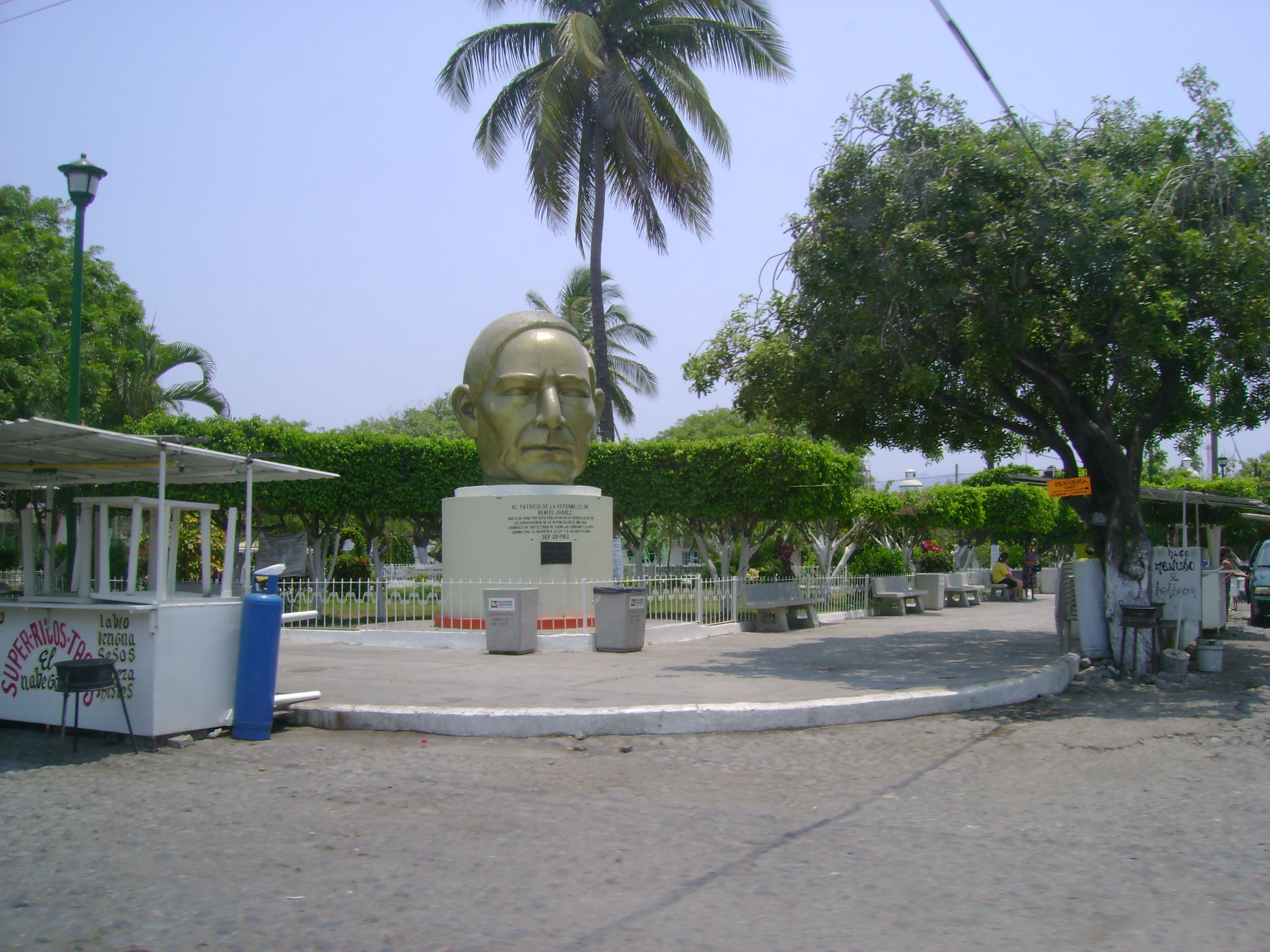 Centro del poblado de Cuyutlan, Colima.